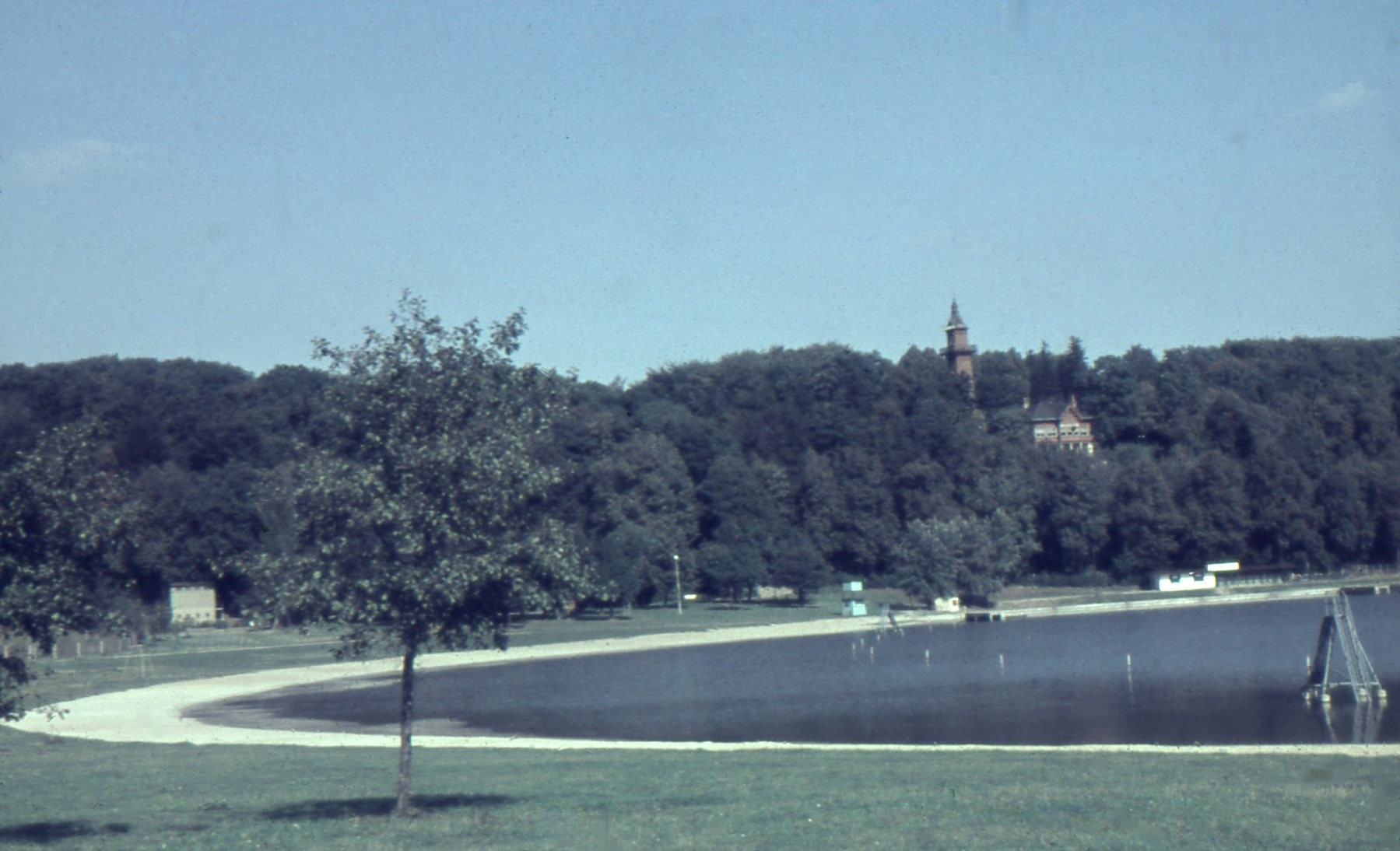 Das Volksbad (Weinlache) und der Weinberg mit Weinberghaus und Weinbergturm um 1970